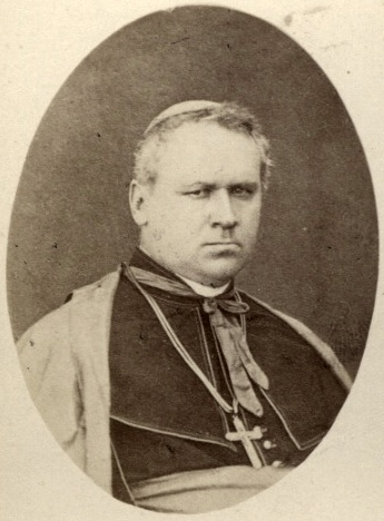 Bischof Franz Joseph Rudigier, Linz